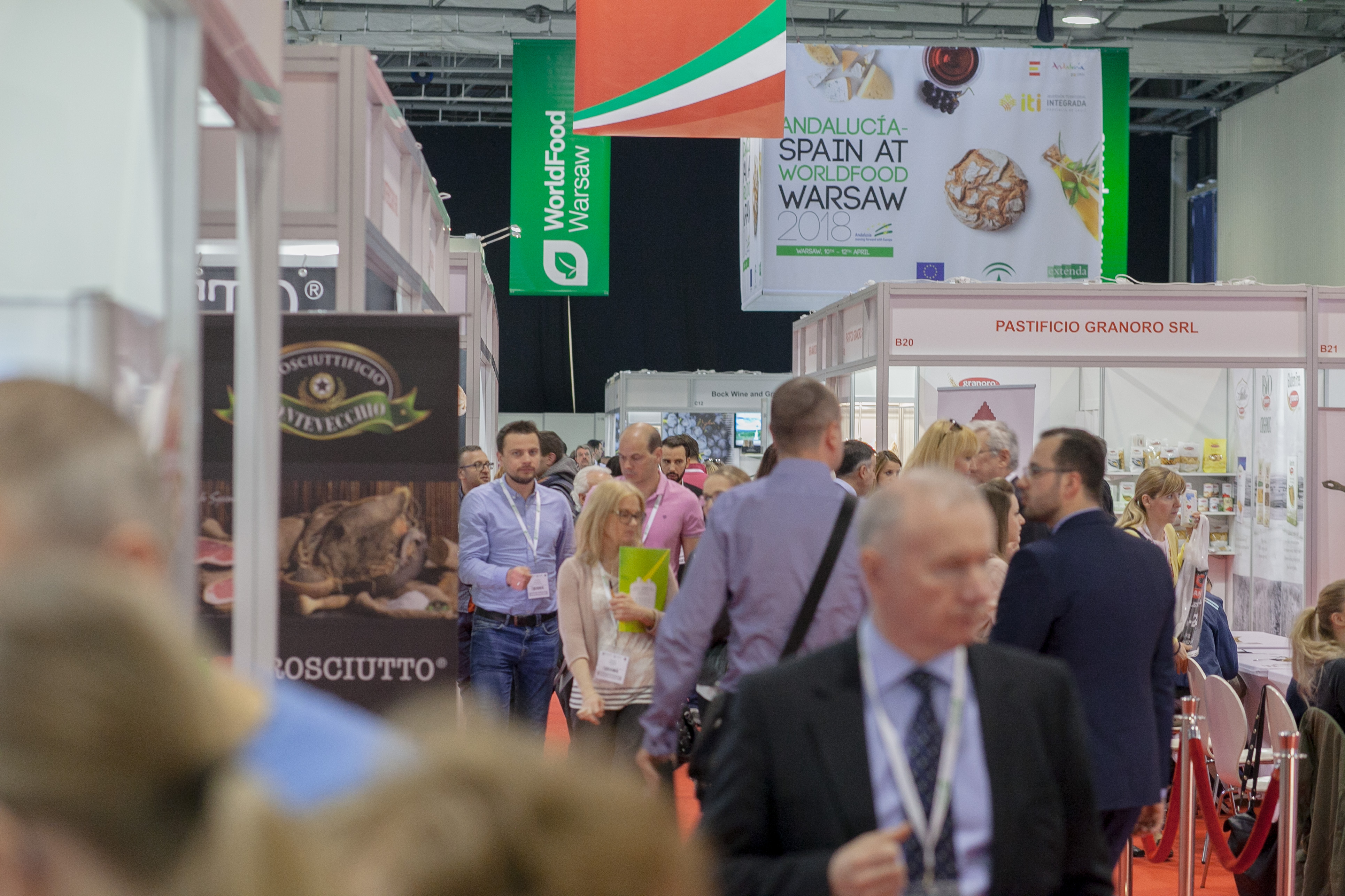 WorldFood Poland